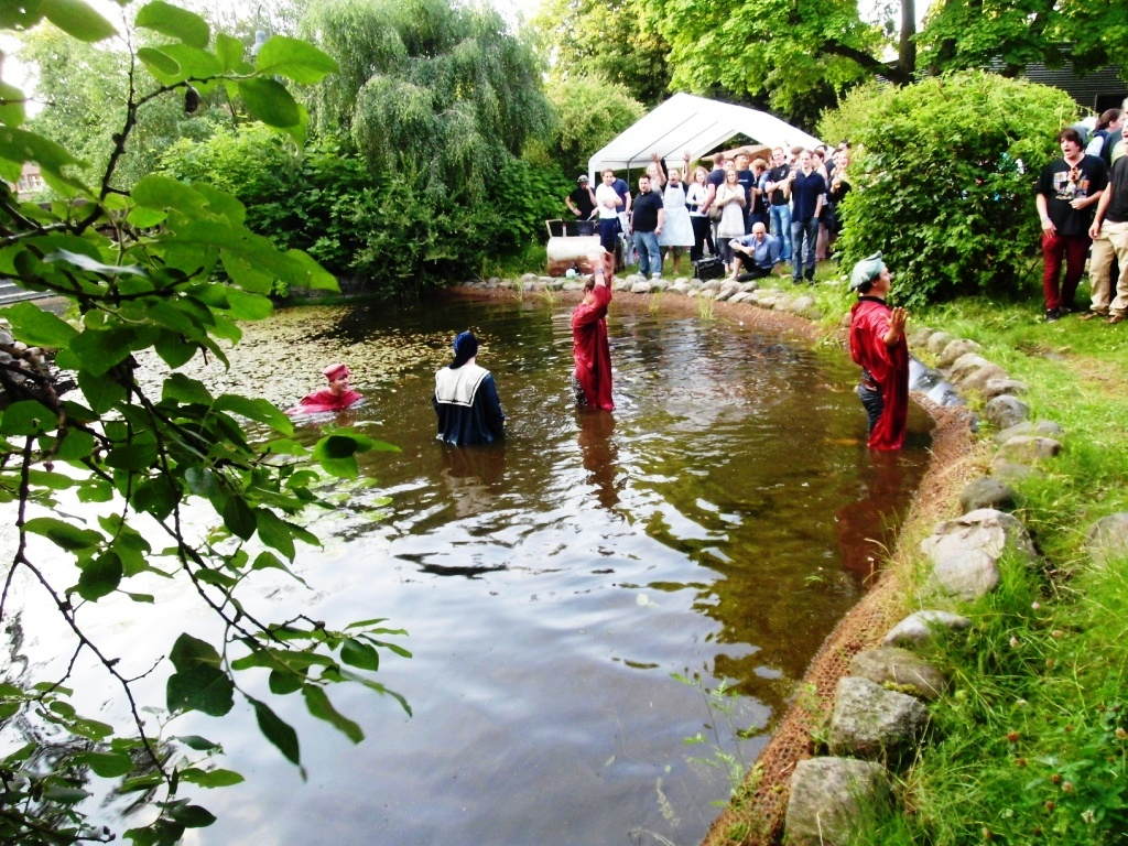 Hok Schwimmt